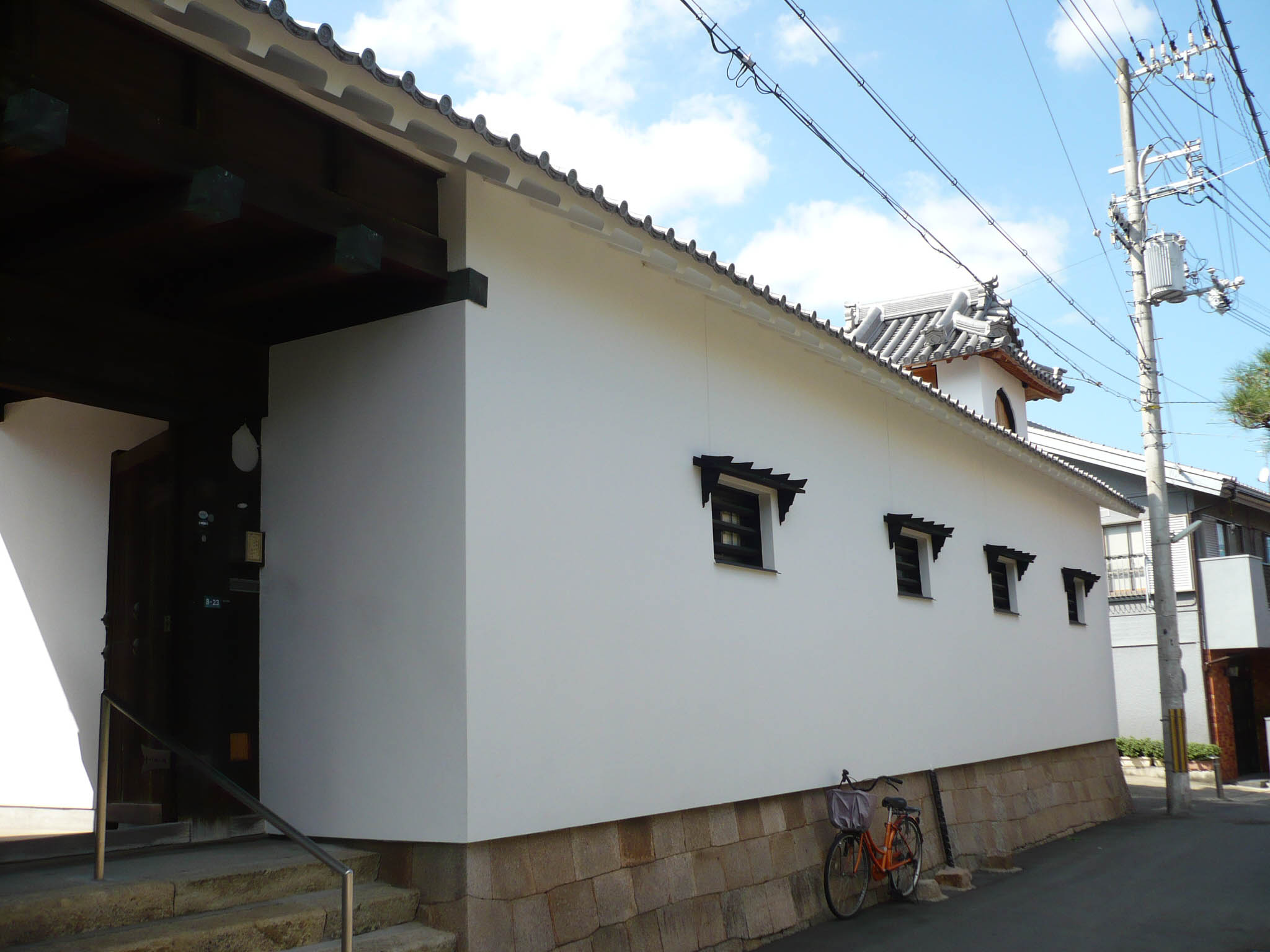 太鼓楼